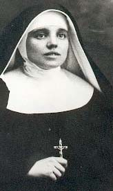 Sr.Marija vom gekreuzigten Jesus Petkovic